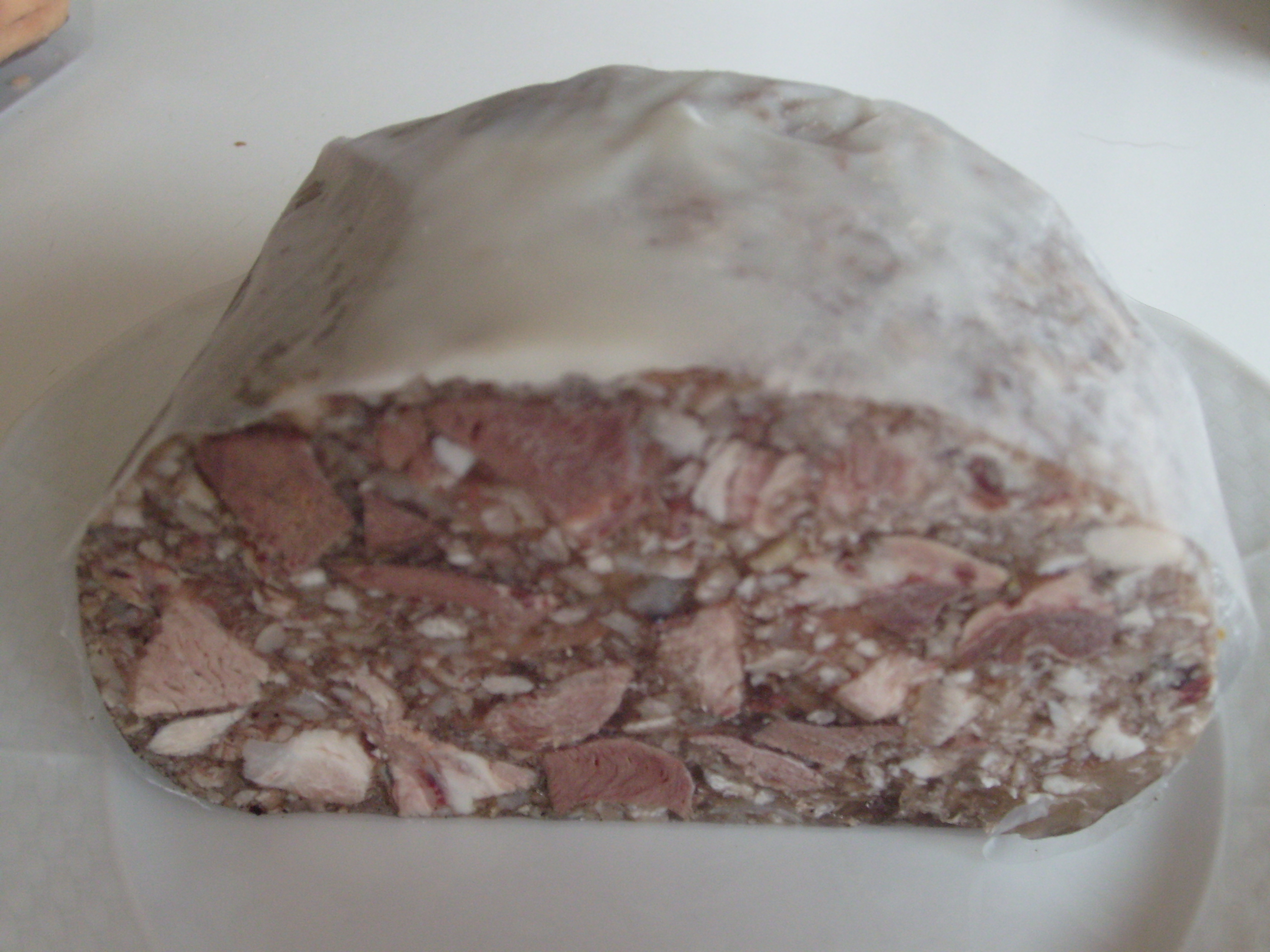 Domácí světlá tlačenka.